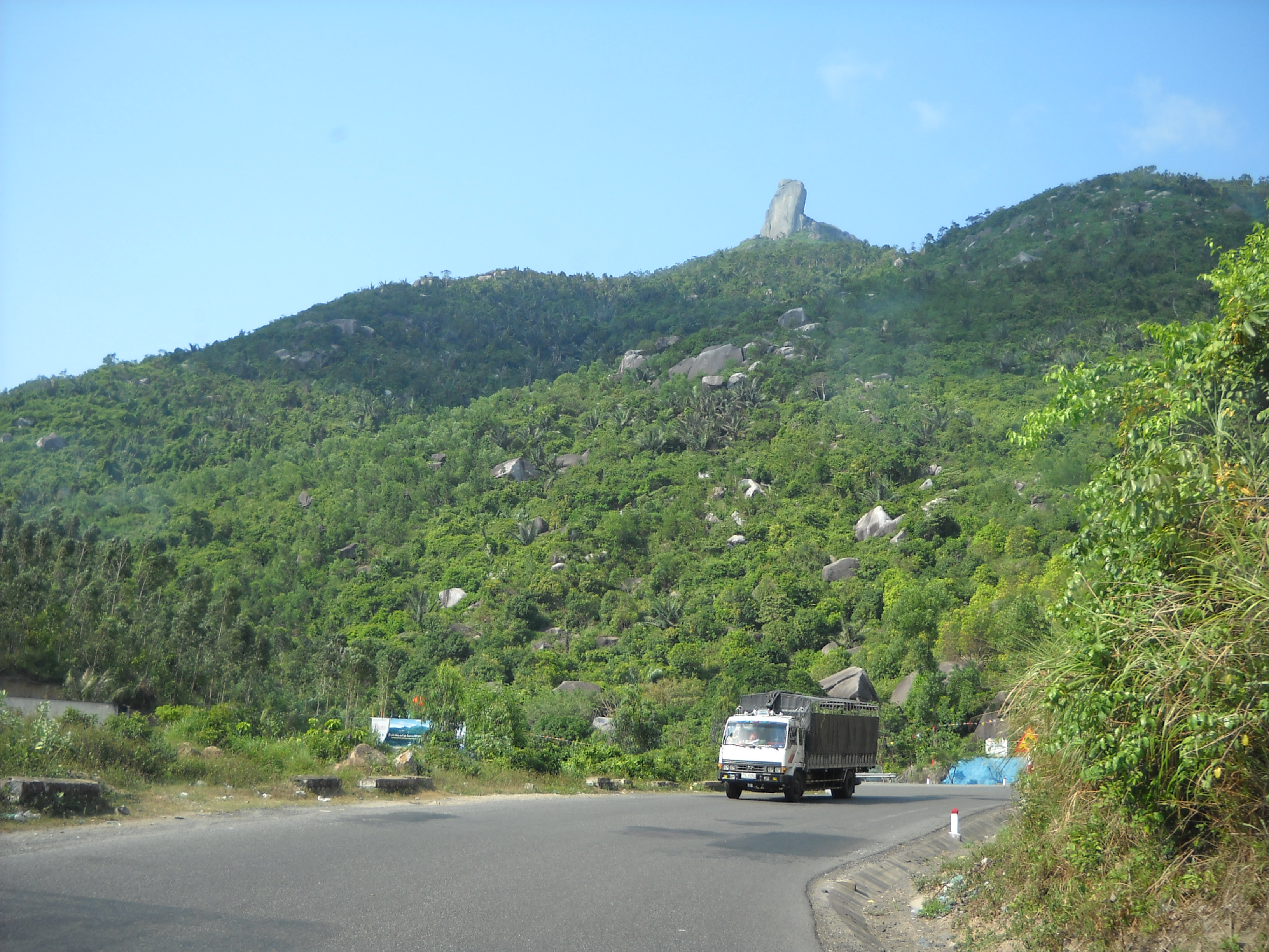 Núi Đá Bia, Nam phần Phú Yên.